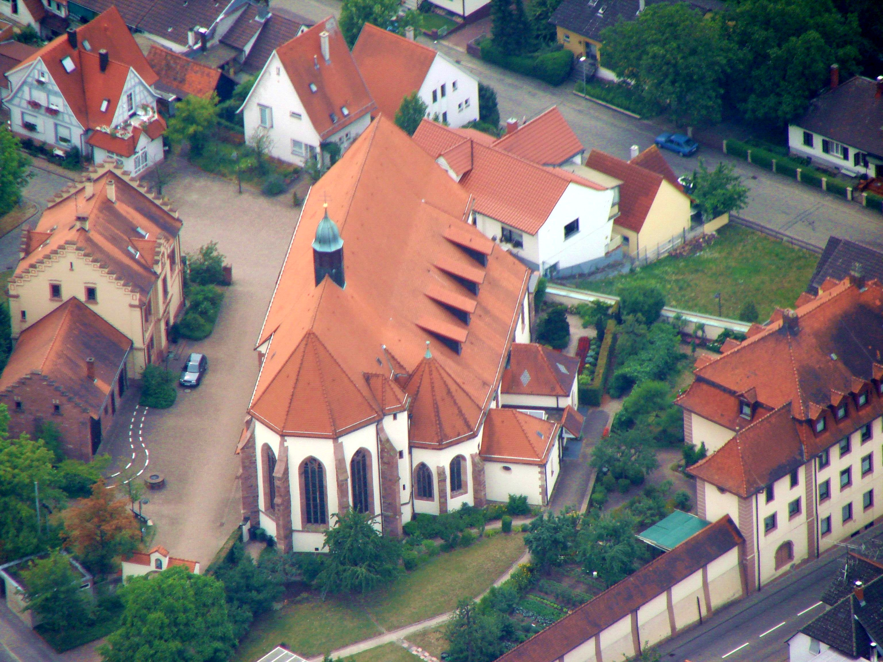 Luftbild-Aufnahme vom Kloster Maria Bickesheim